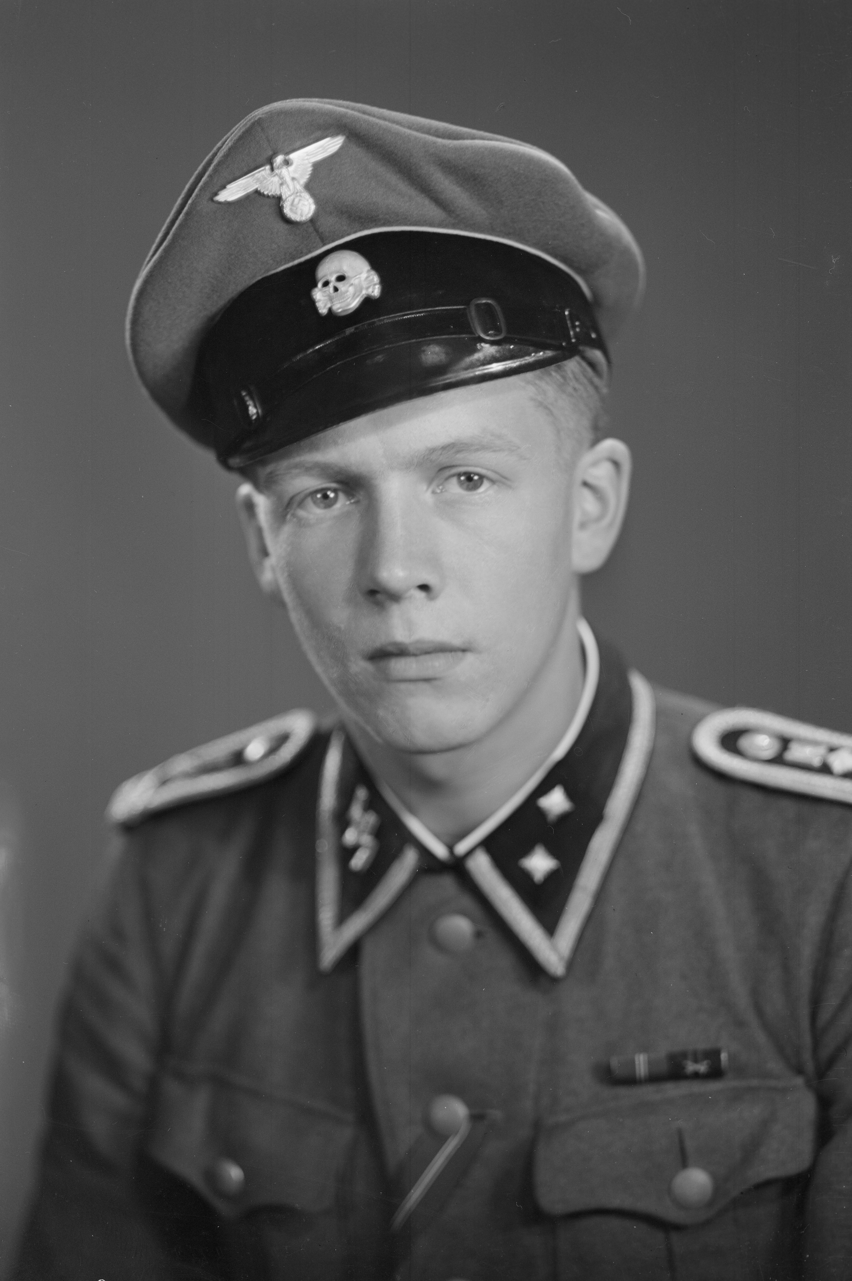 Suomalainen SS-sotilas Rainer Sormunen kuvattuna vuonna 1943